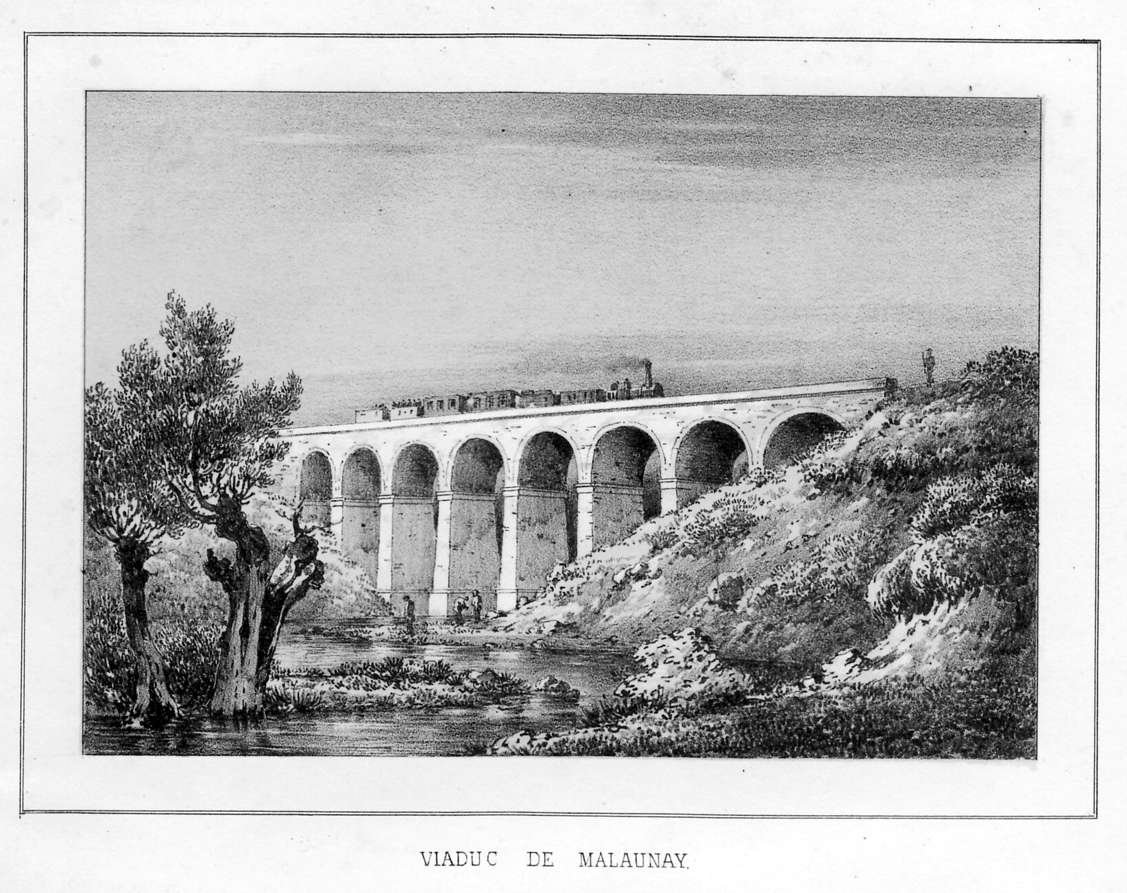 Viaduc de Malaunay sur le chemin de fer de Rouen au Havre